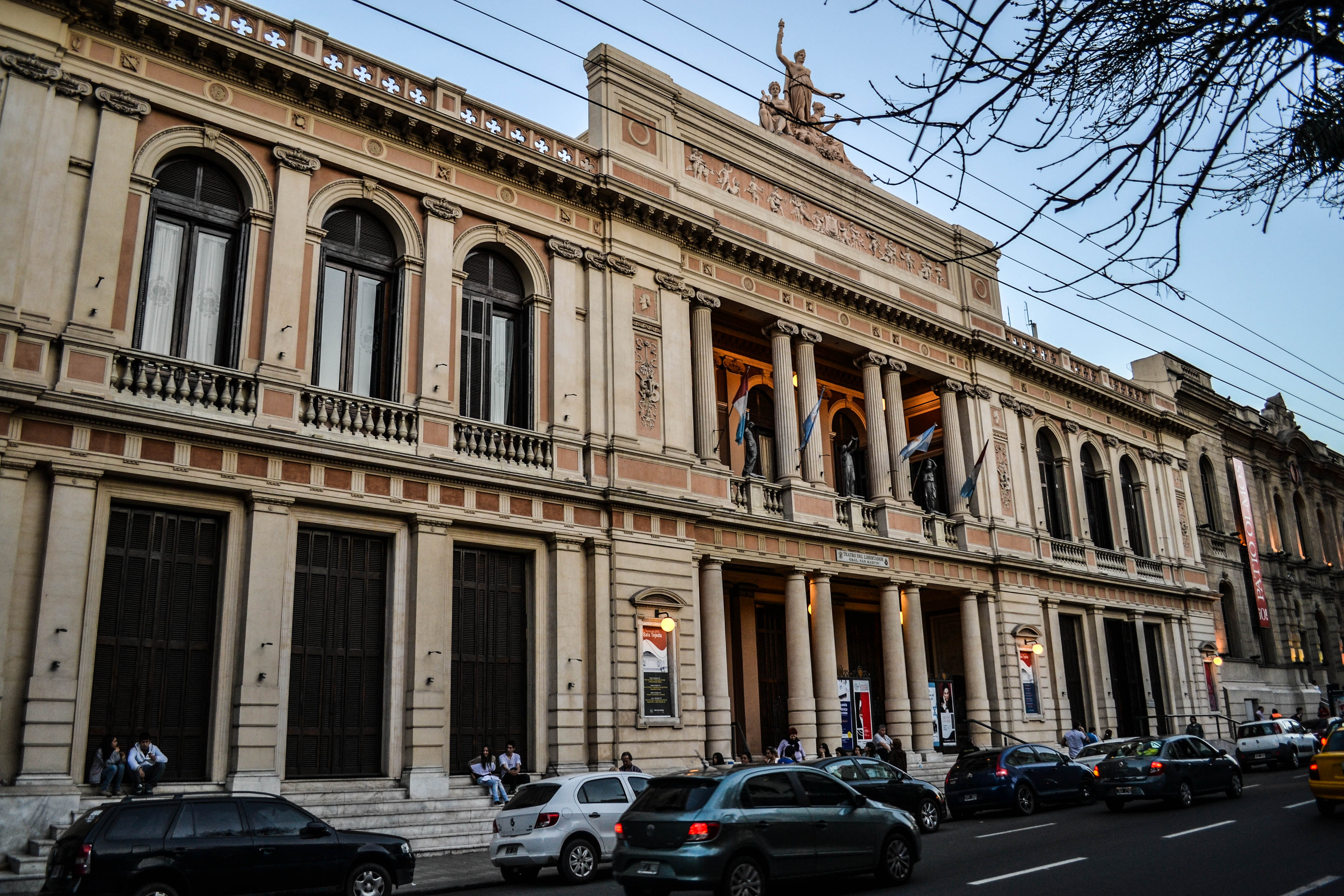 Teatro del Libertador General San Martín